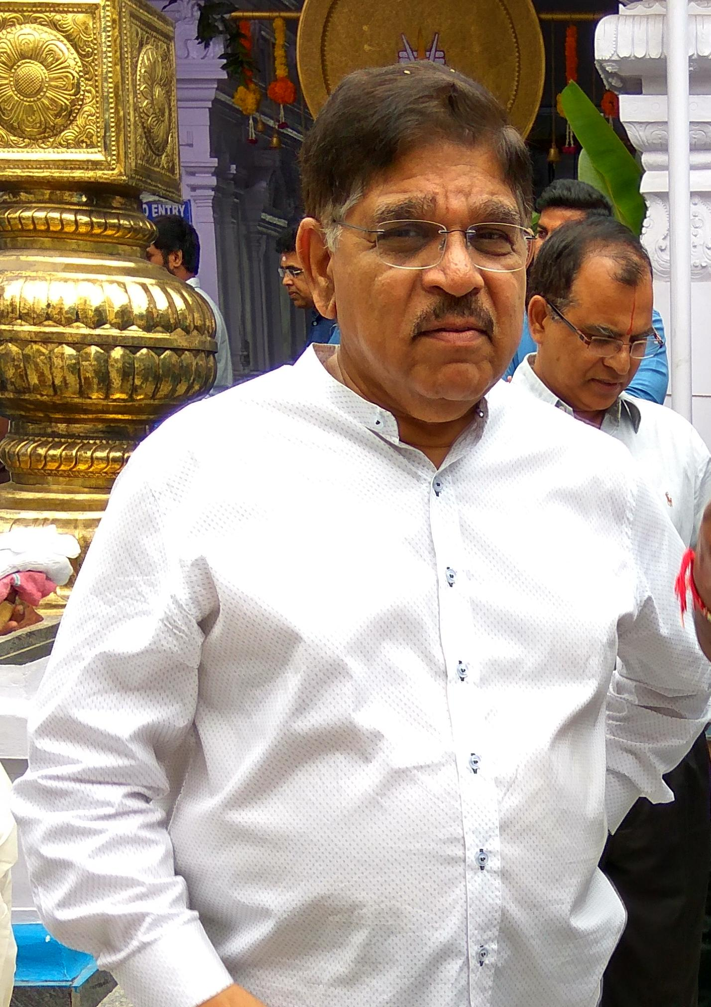 అల్లు అరవింద్